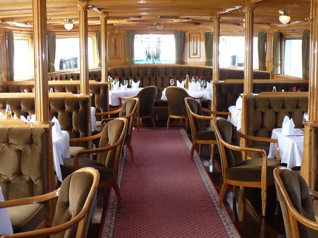 Bodensee-Dampfschiff Hohentwiel Speisesaal